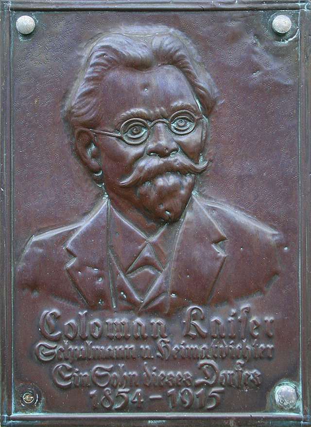 Gedenktafel für Koloman Kaiser, Schulmann und Heimatdichter aus Hornsburg im Weinviertel